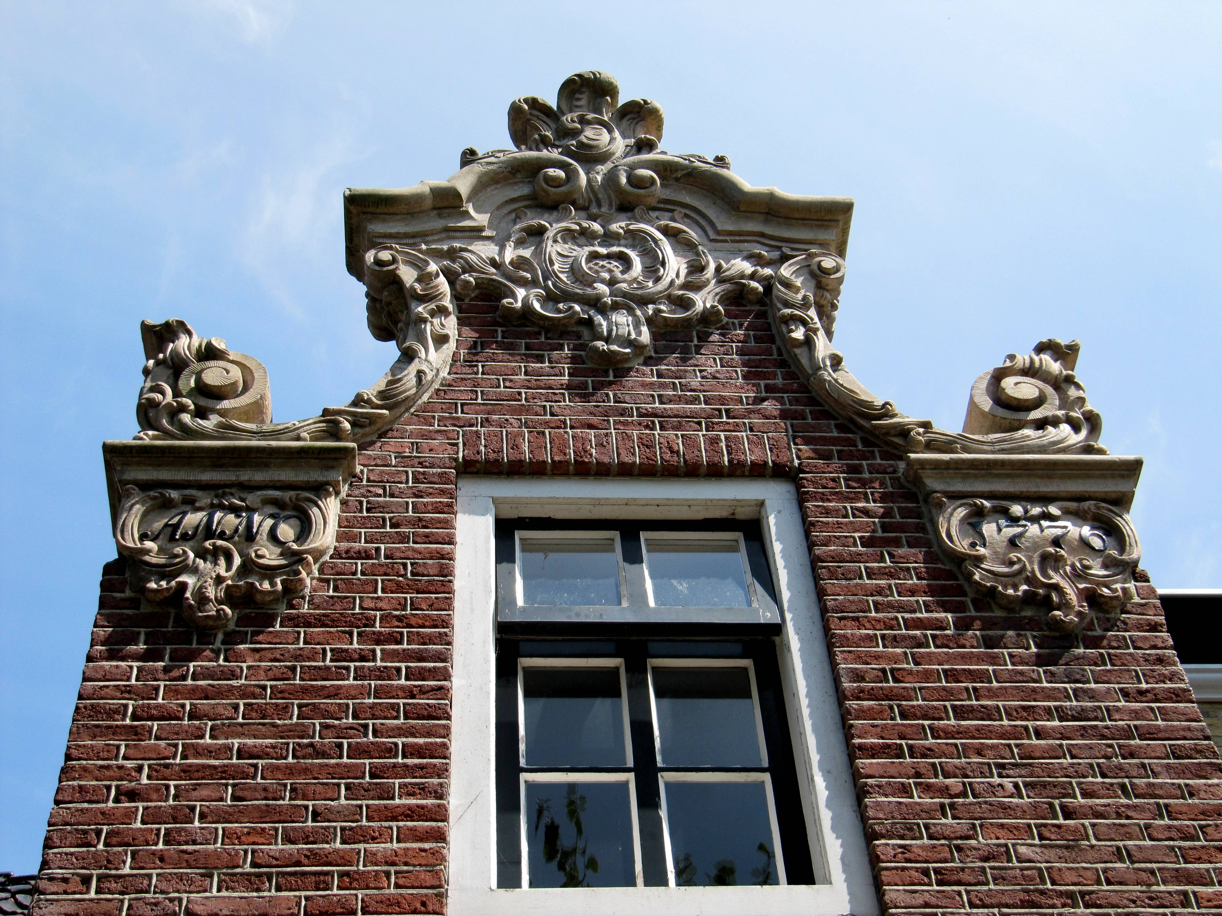 Topgevel met natuurstenen beeldhouwwerk in Friese Lodewijk XV-stijl, 1776